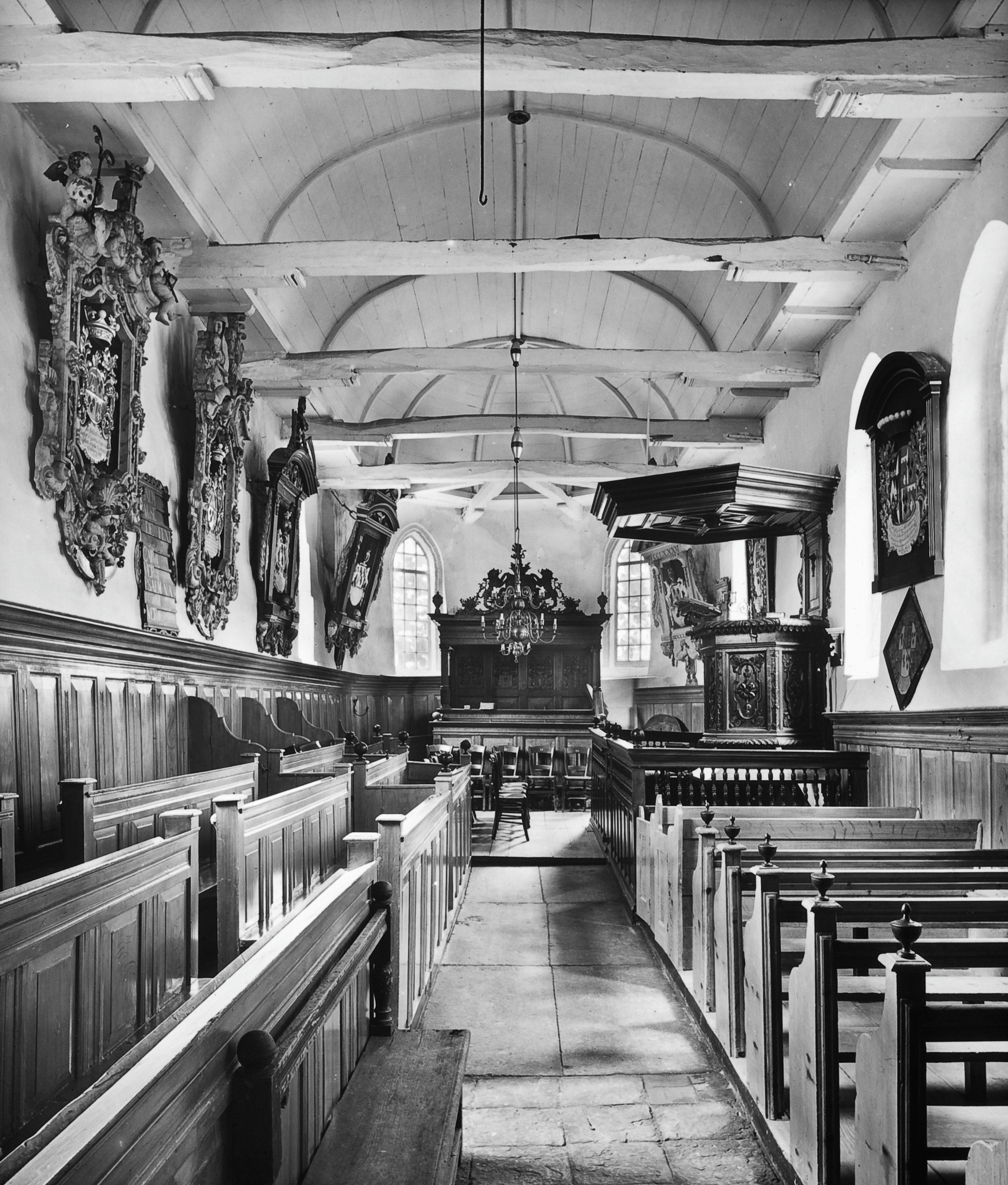 Nederlands Hervormde Kerk: Overzicht van het interieur met tongewelf, wapenborden en kerkmeubiliar